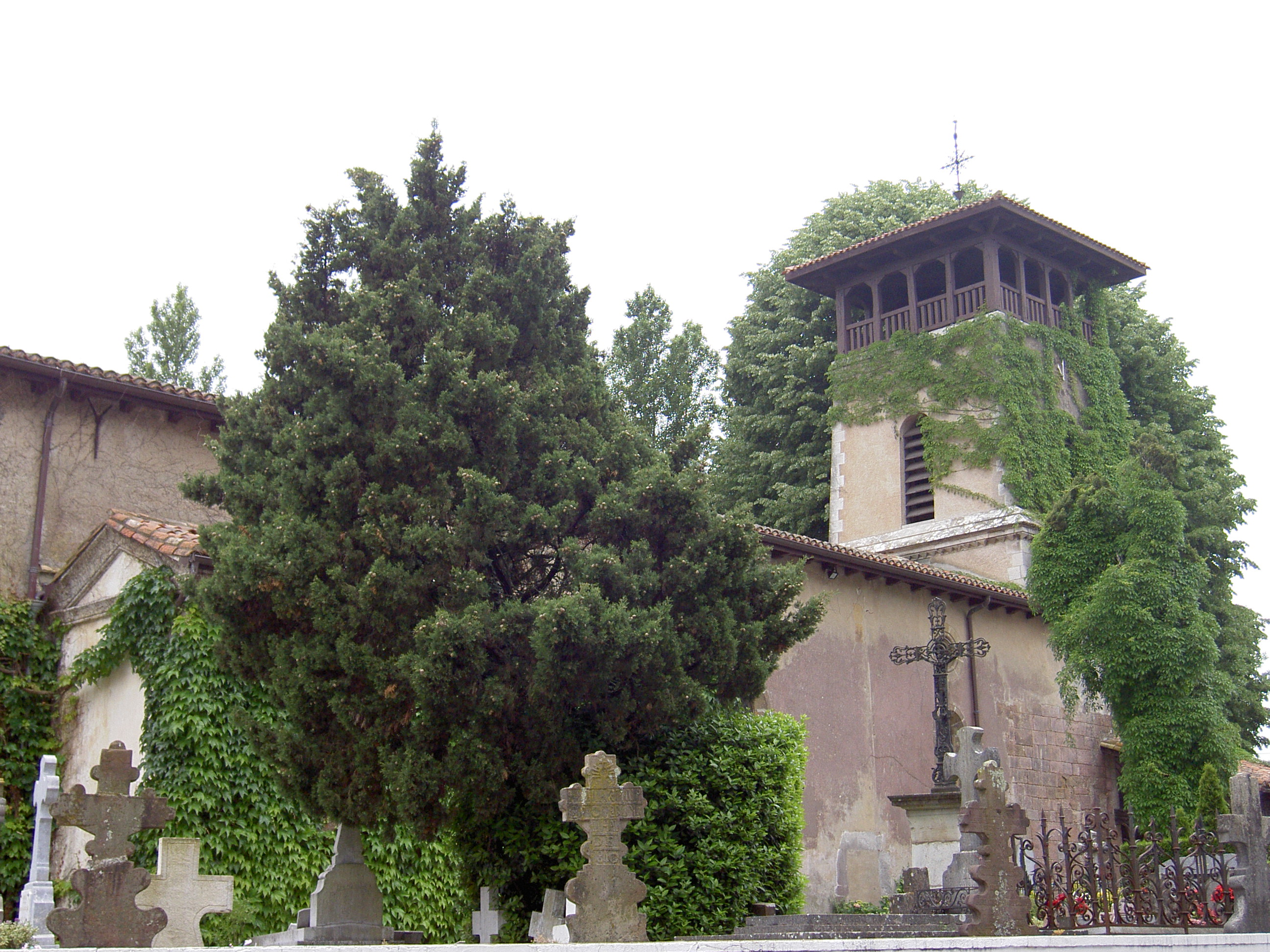 Photographie de l'église du village français d'Arcangues.